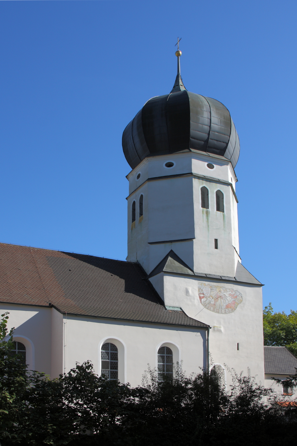 Kern 15. Jahrhundert, 1709 und 1911 vergrößert; mit Ausstattung.This is a photograph of an architectural monument.